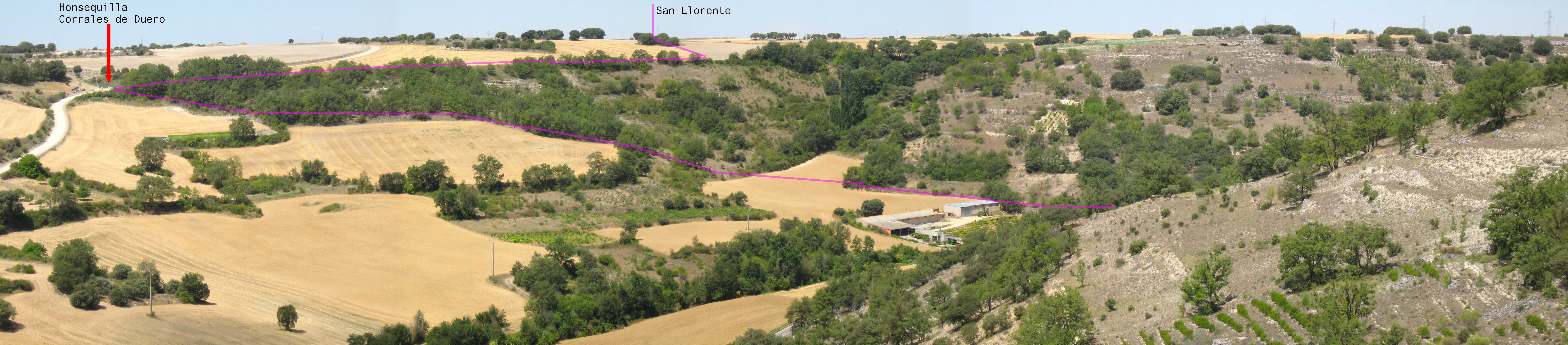 Valle del Cuco. San Llorente. Corrales. Honsequilla. La Cueva (Puentecilla)